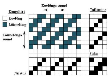 Kanga rakendus: kangakiri, tallamine, niietus, sidus